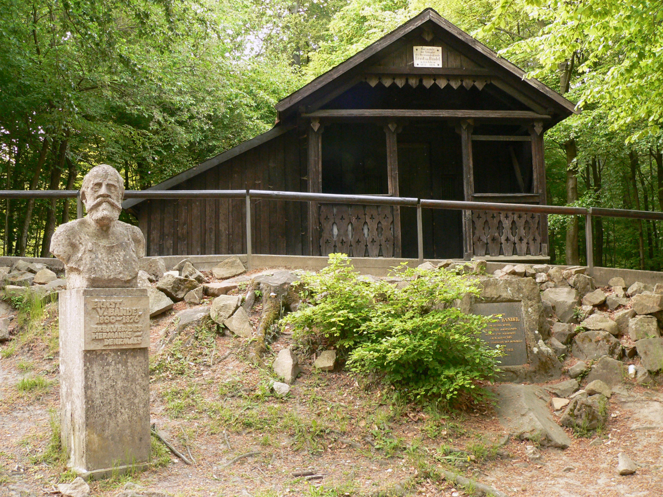 Ehemalige Wohnhütte von Ernst von Bandel am Hermannsdenkmal